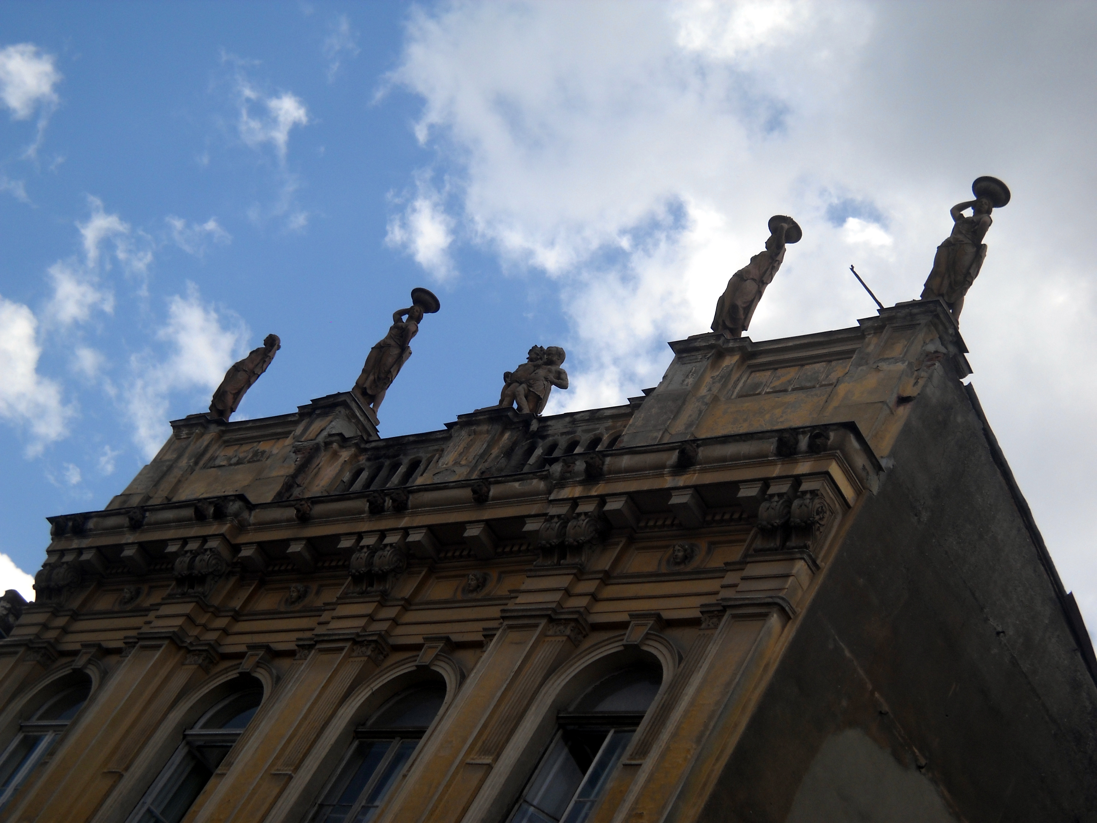 Centrul istoric al orașului Brașov, casă de pe strada Republicii